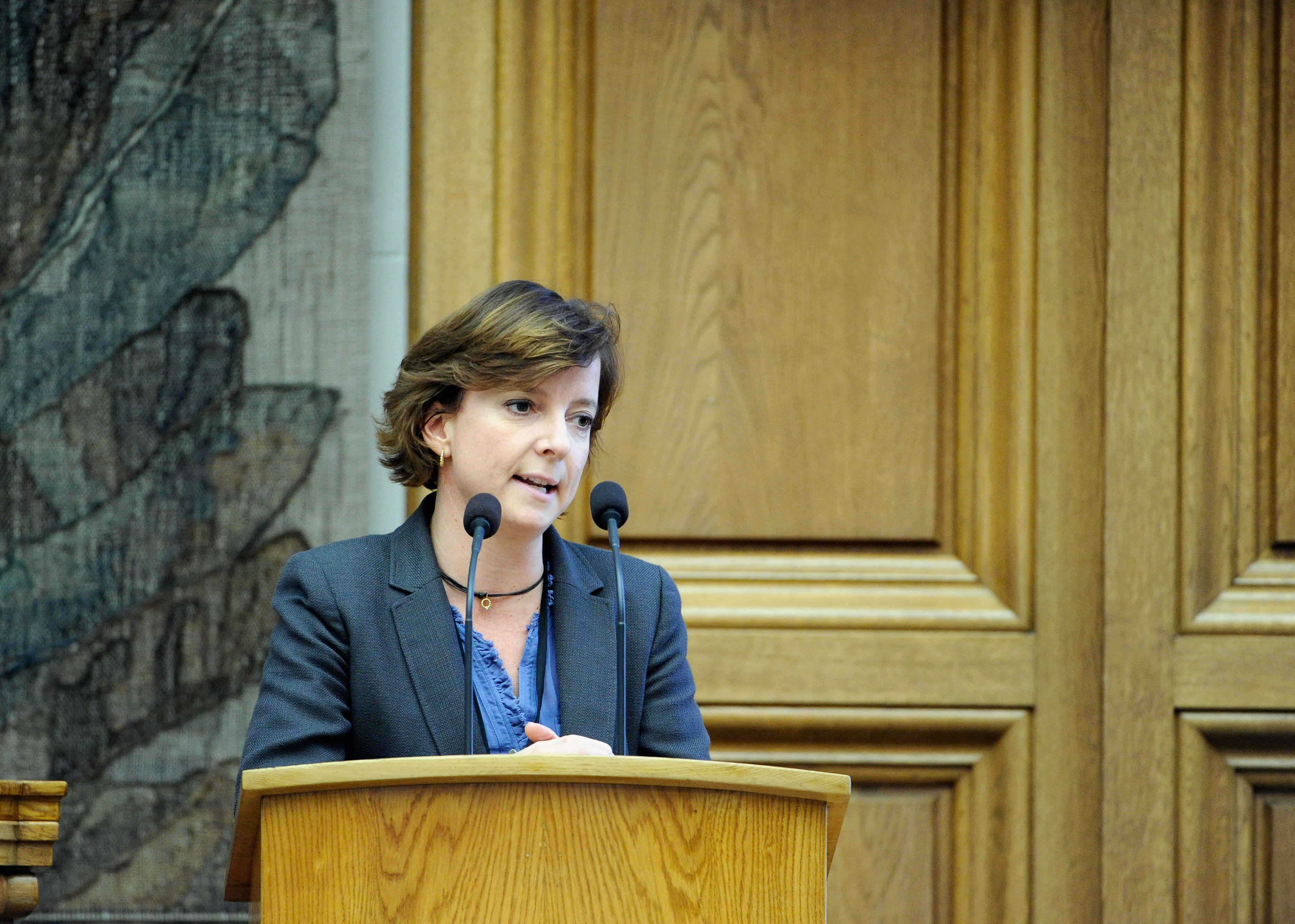 Karen Ellemann (V) Danmark. Nordiska rådets session 2011 i Köpenhamn